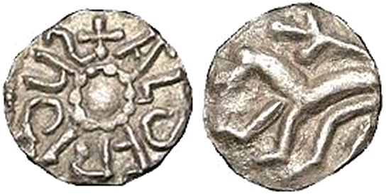 Münze des Königs Aldfrith von Northumbria (686–705)